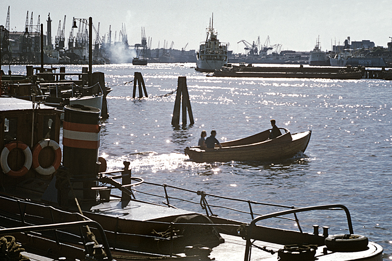 Båtar vid hamnen. Motiv: Göteborgs hamn Nyckelord: Riksintressen Kategori: Hamn, Hamnmiljöer Båtar vid hamnen.